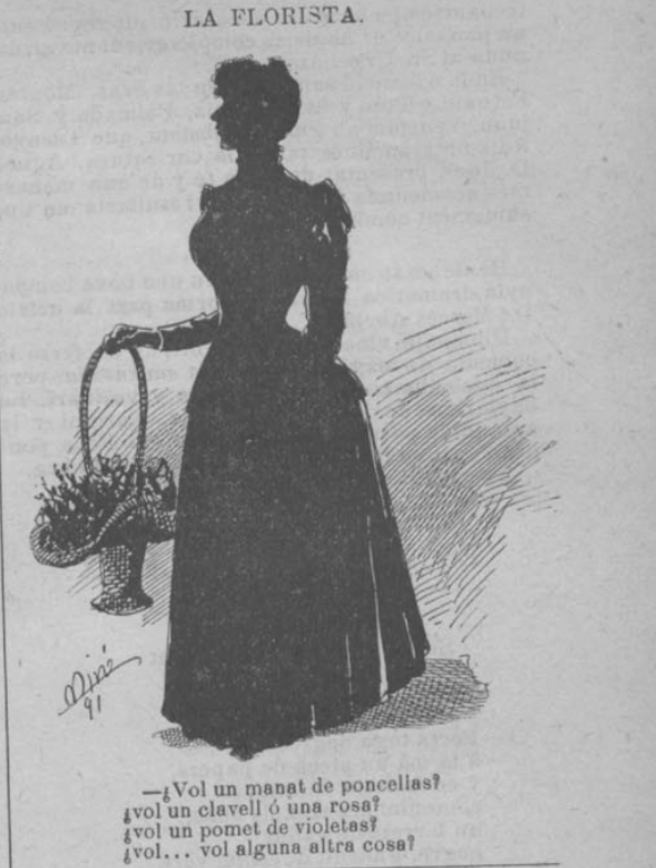 Detalle de una página de la revista La Esquella de la Torratxa